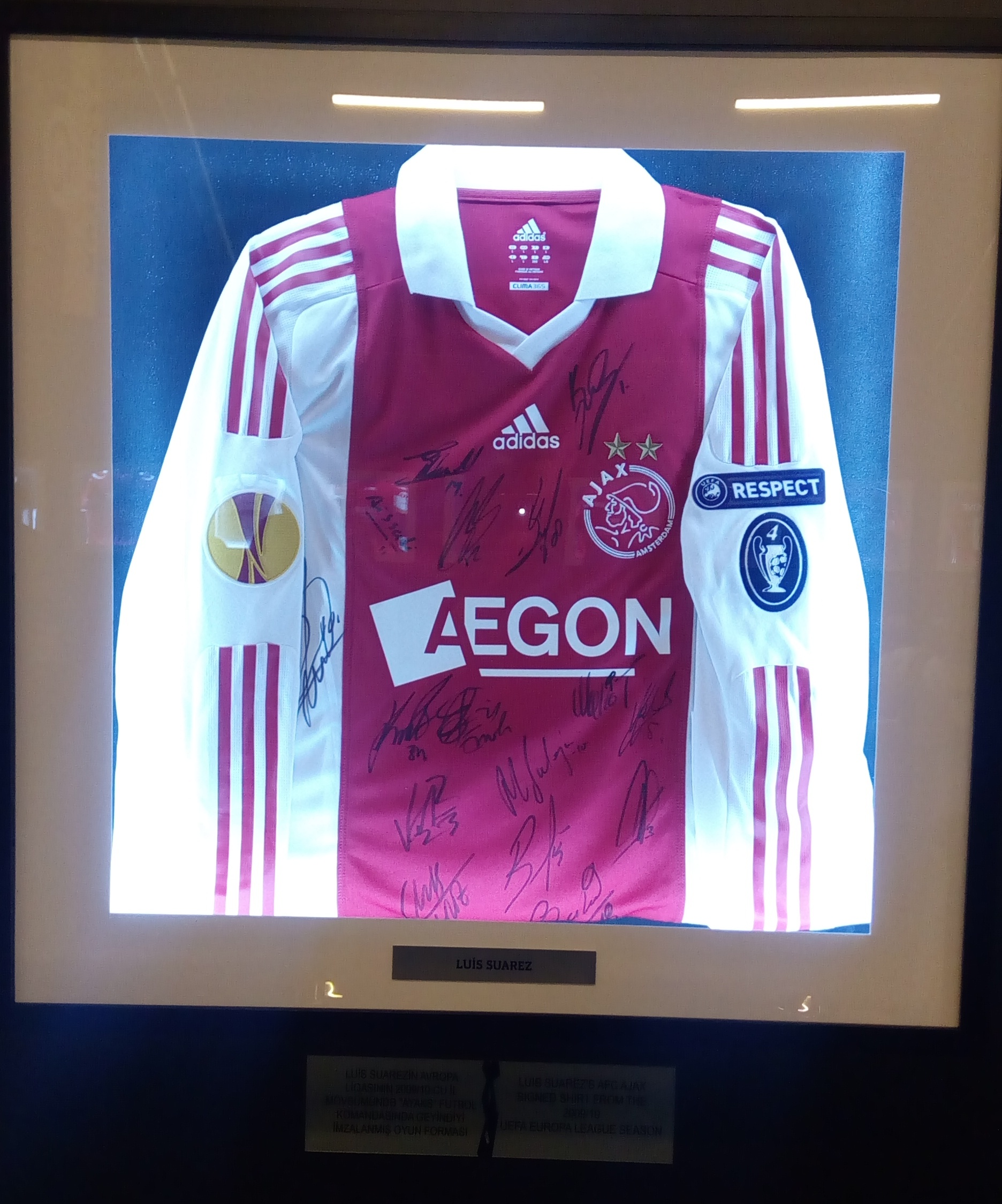 Avropa Liqası Muzeyi Bakıda